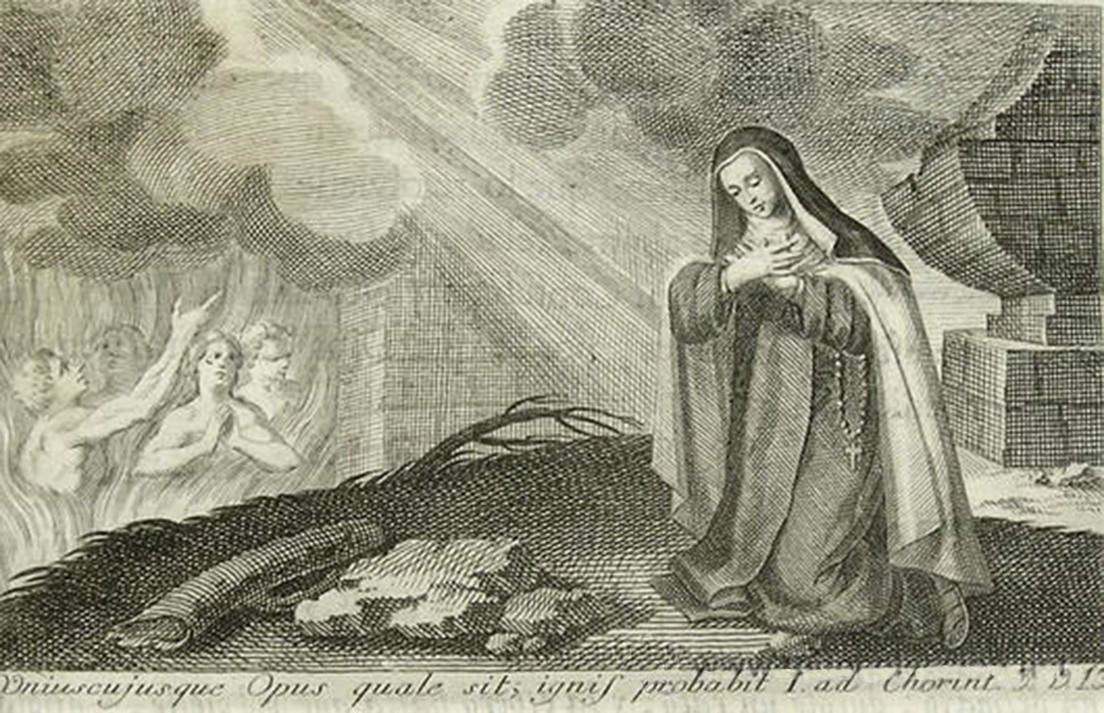 Grabado de Francisca del Santísimo Sacramento. Obras del ilustrisimo Don Juan de Palafox y Mendoza Obispo de la Puebla de los Angeles y de Osma. Tomo VIII que contiene: Luz a los vivos y escarmiento en los muertos y Vida de San Henrique Suson.